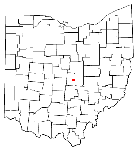 A map.